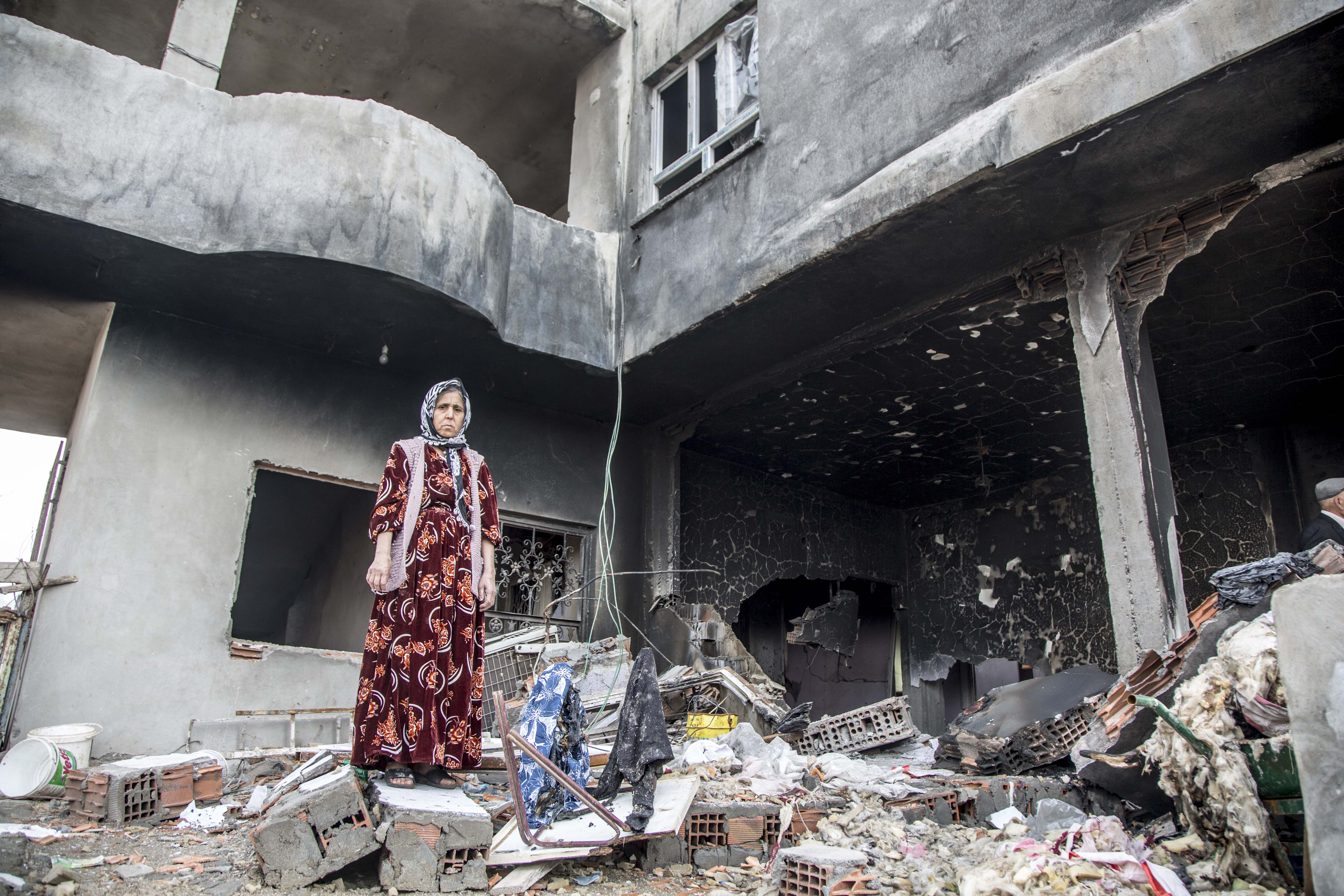 Silopi'deki çatışmalar sırasında hasar gören bir bina ve önündeki kadın, 22 Ocak 2016